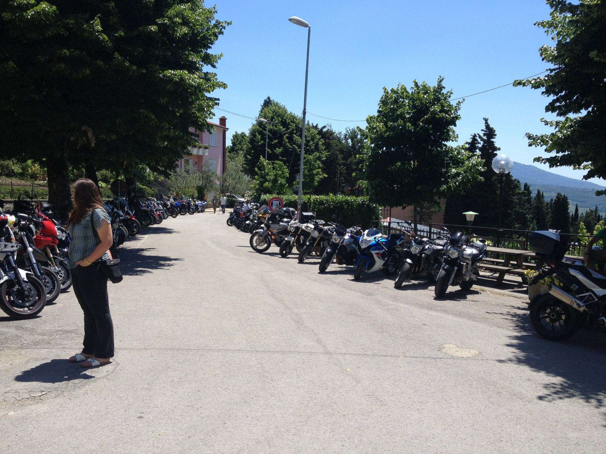 Immagine dell'edizione 2013 della manifestazione "Motopenna all'aconese"